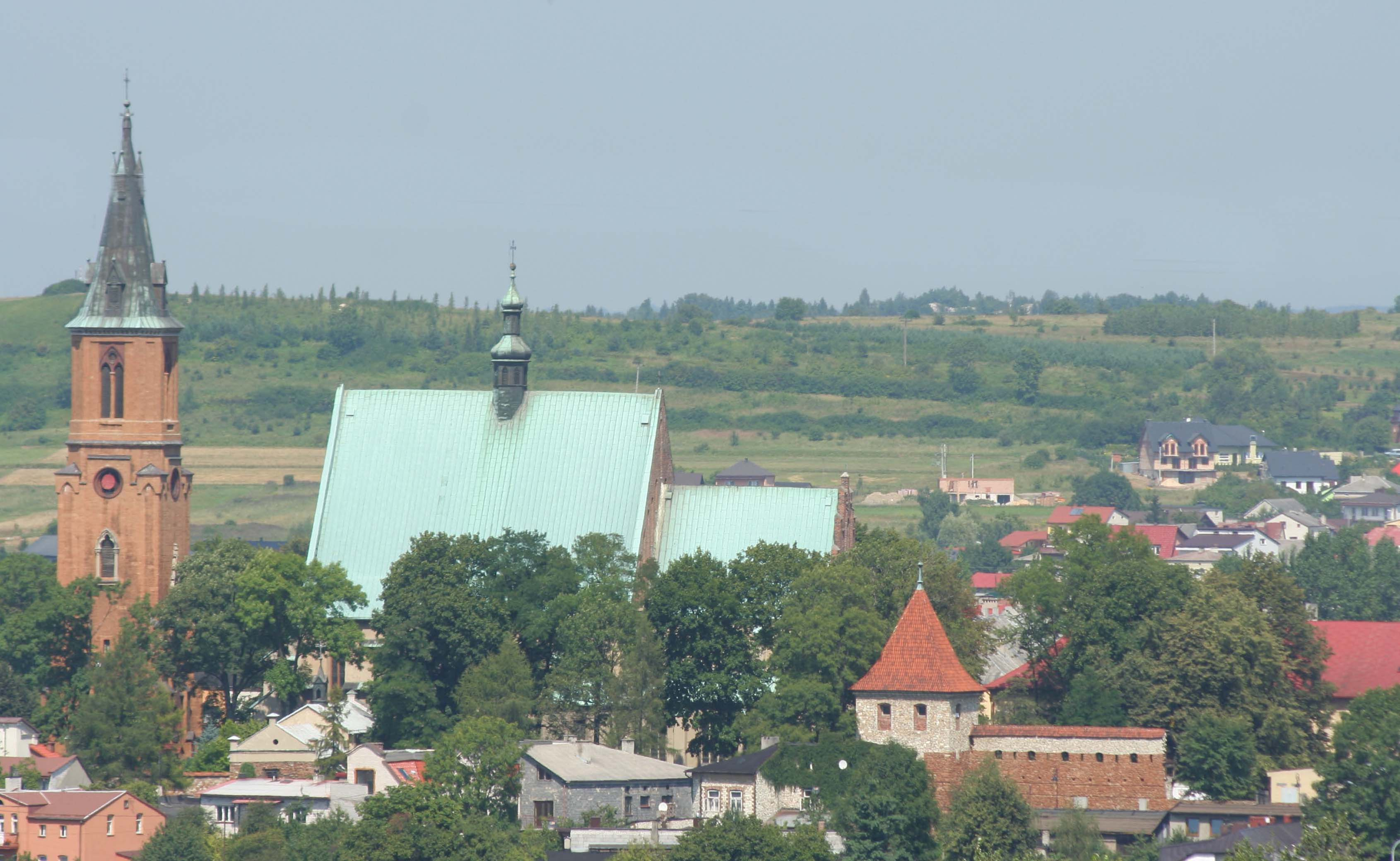 Widok na Bazylikę Mniejszą św. Andrzeja.